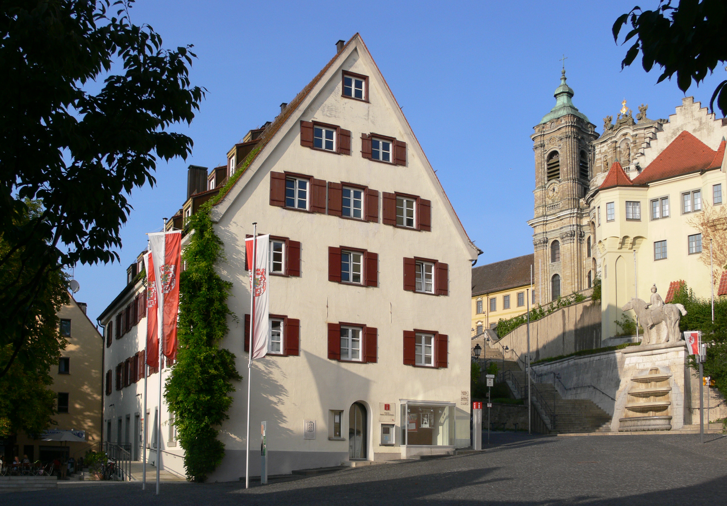 Weingarten (Württemberg), Landkreis Ravensburg Münsterplatz mit Aufgang zur Basilika, links ehemaliges Amtsgebäude der Landvogtei Schwaben von der Zeit nach dem Dreißigjährigen Krieg bis 1806